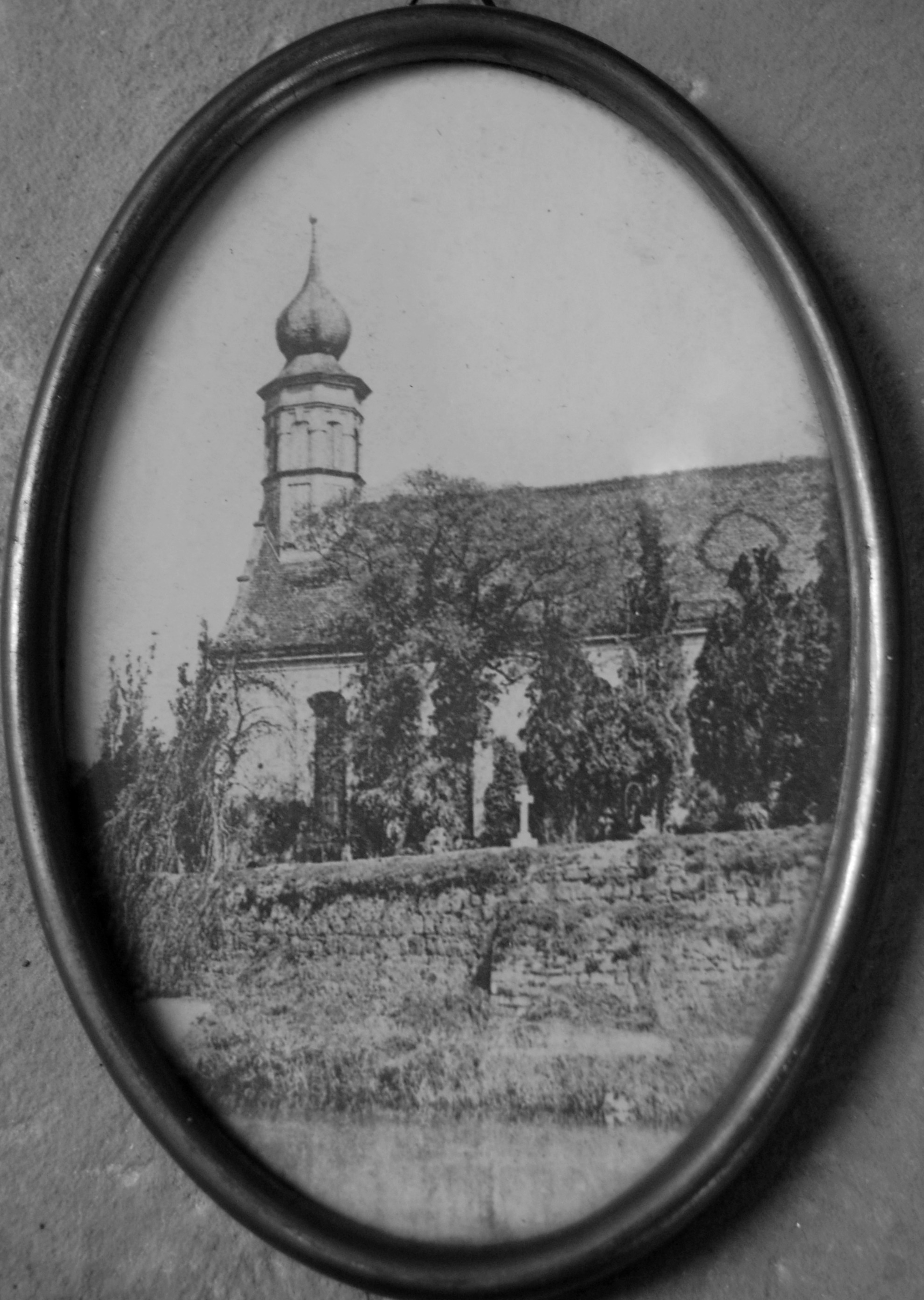 Aufnahme des Vorgängerbaus der heutigen Sankt-Gertraud-Kirche in Magdeburg-Salbke, Aufnahme auf der Rückseite auf den 31.5.1876 datiert, möglicherweise jedoch älter, da die heutige Kirche bereits 1866/67 entstanden sein soll